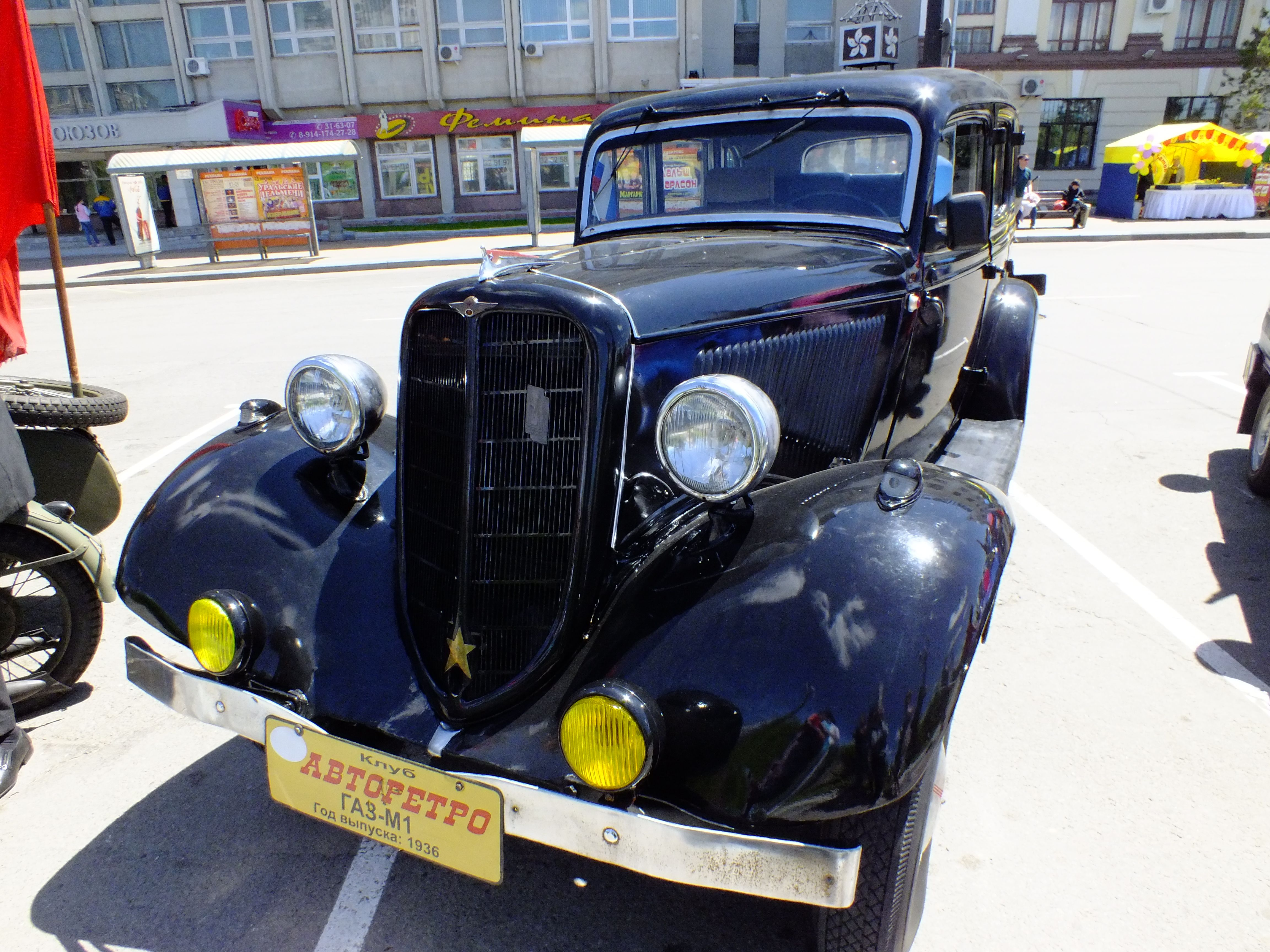 GAZ-M1